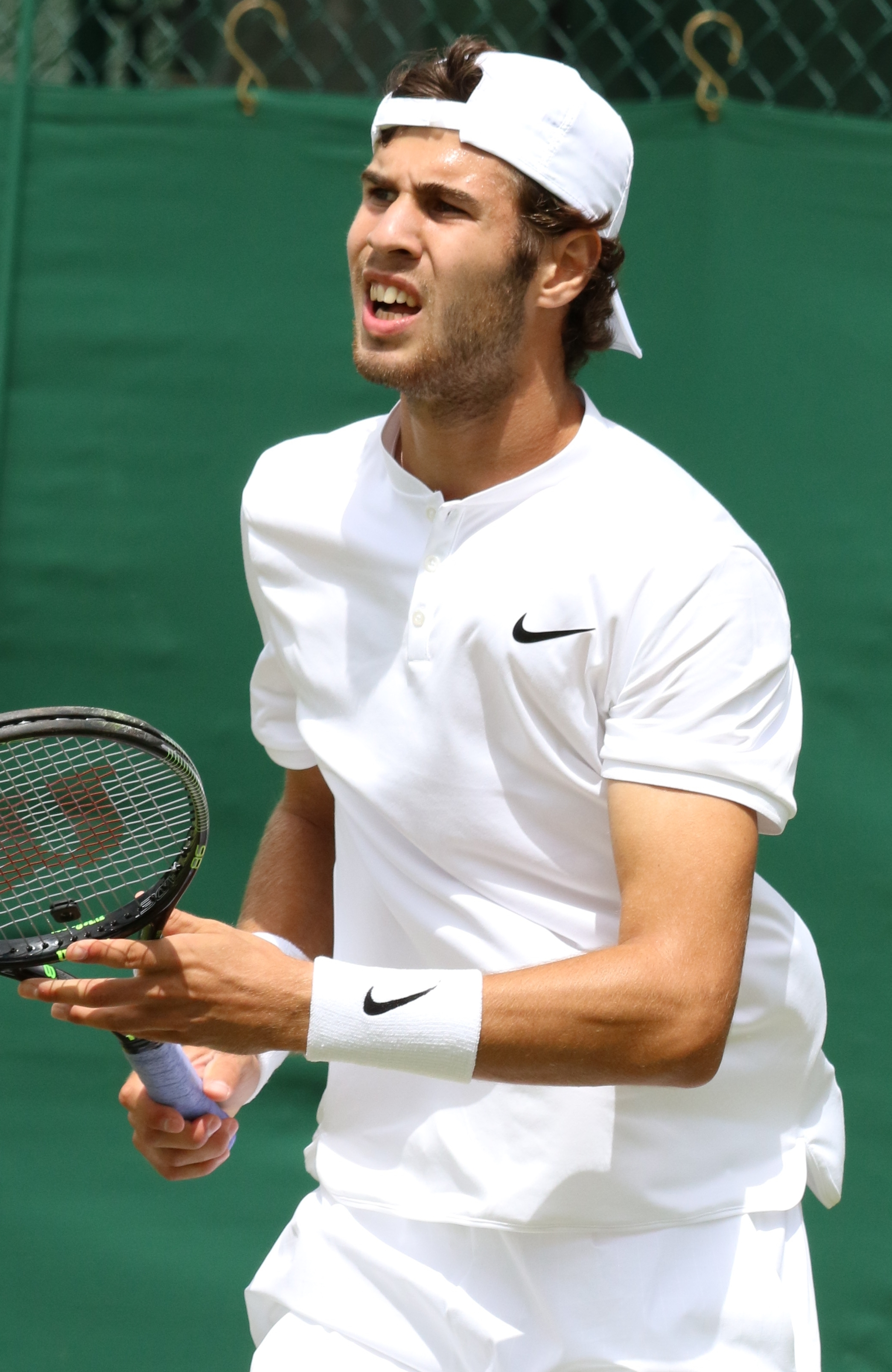 Khachanov WMQ16 (11)